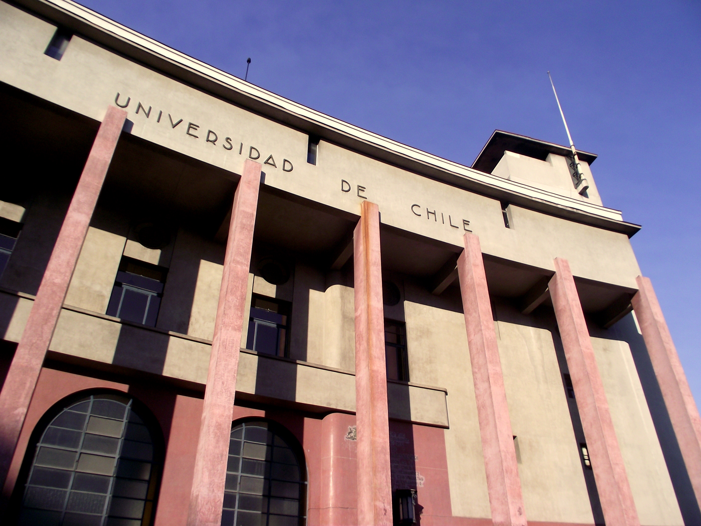 Facha de la Facultad de Derecho ubicada en Pío Nono.